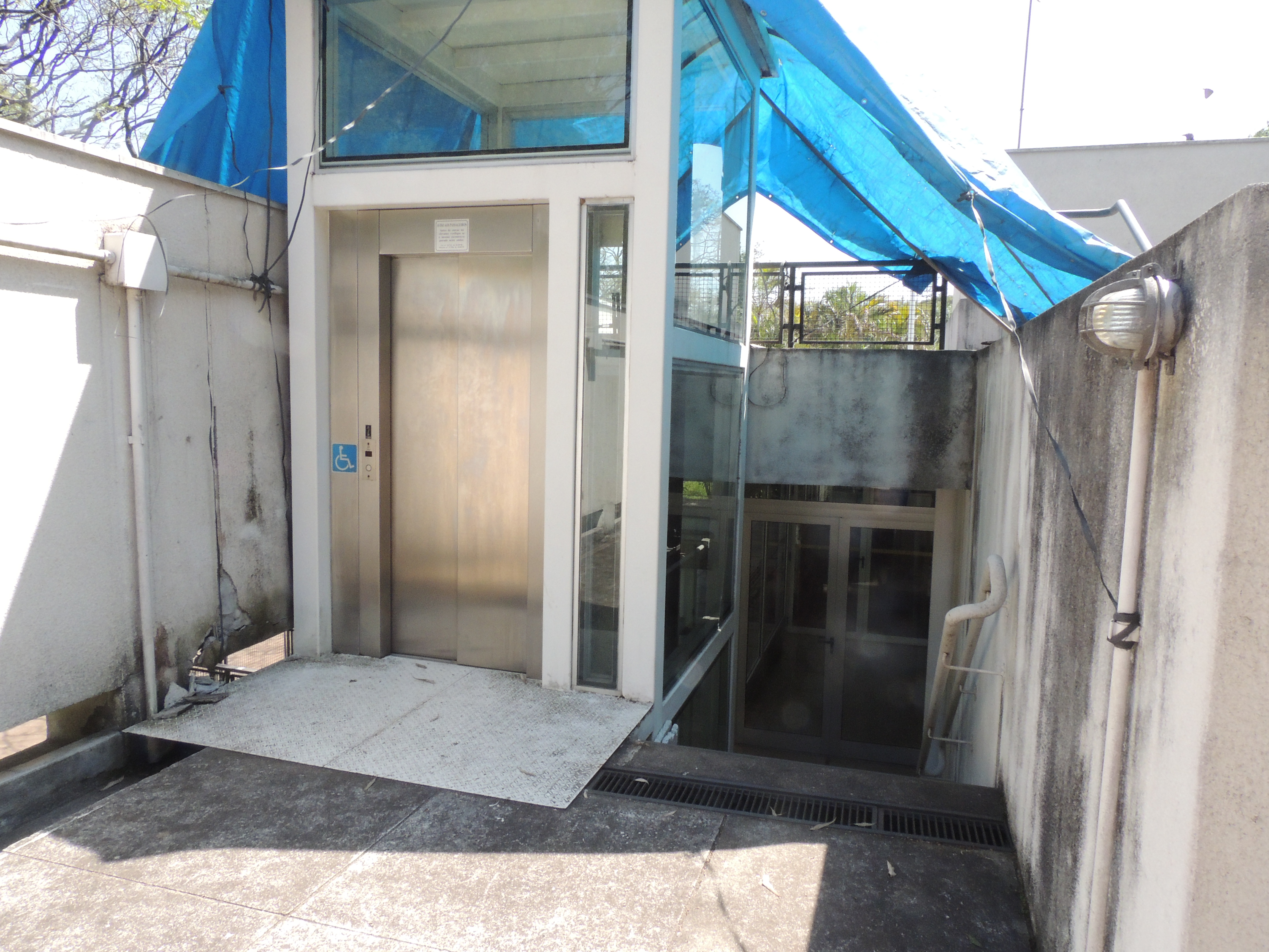 Detalhe do elevador e escada que dão acesso ao terraço da Escola Municipal de Astrofísica Professor Aristóteles Orsini